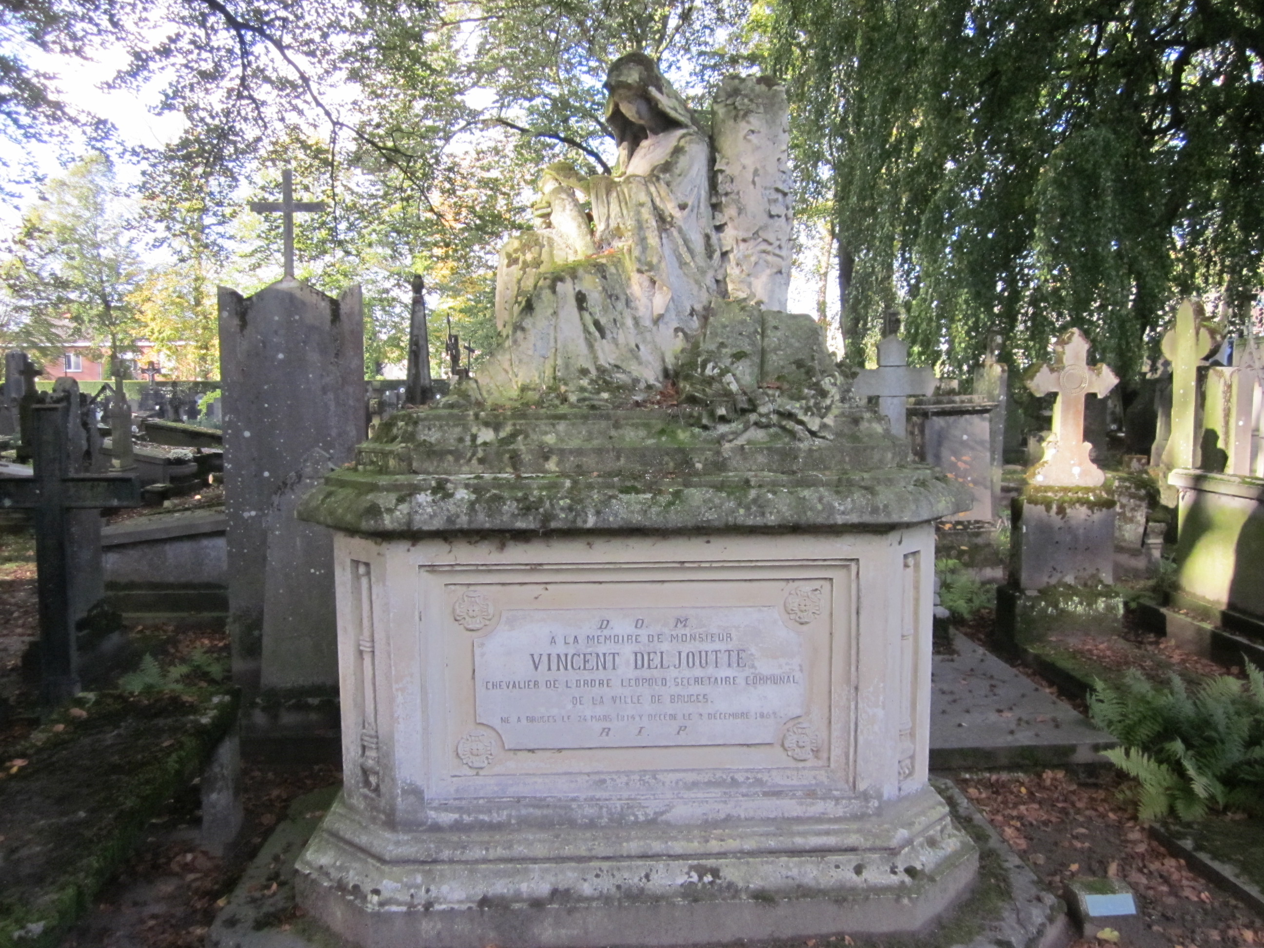 Graf van Vincent Deljoutte (1814-1862) stadssecretaris van Brugge op de Centrale Begraafplaats (Brugs Kerkhof).